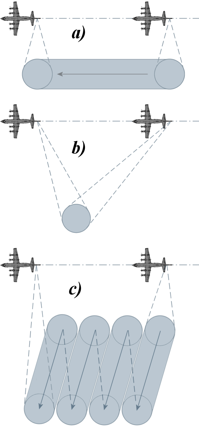 Verschiedene geometrische Moden des SAR-Verfahrens: a)stripmap-SAR; b) spot-SAR; c) Scan-SAR